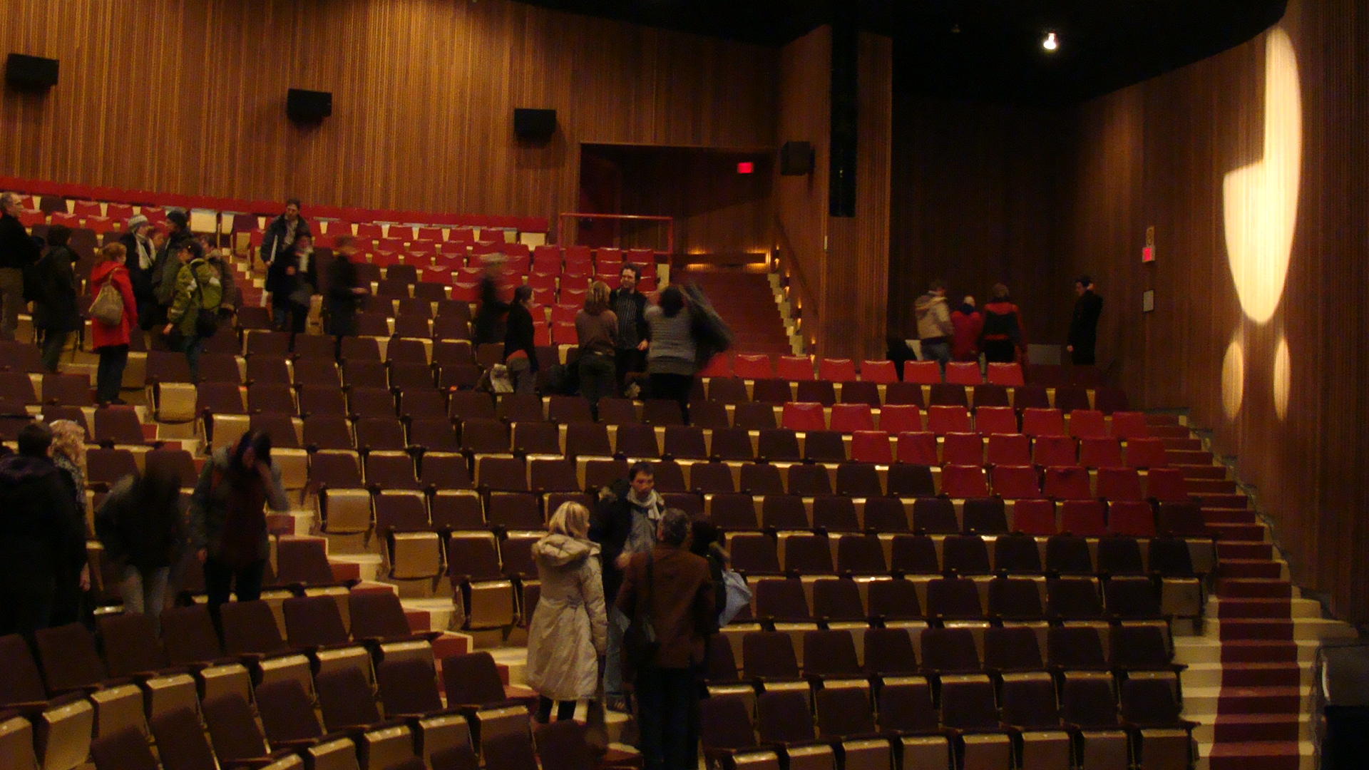 Salle de spectacle de l'Auditorium Dufour, au Cégep de Chicoutimi, Saguenay (Québec, Canada). Vue de la scène, à l'extrême du côté cour.